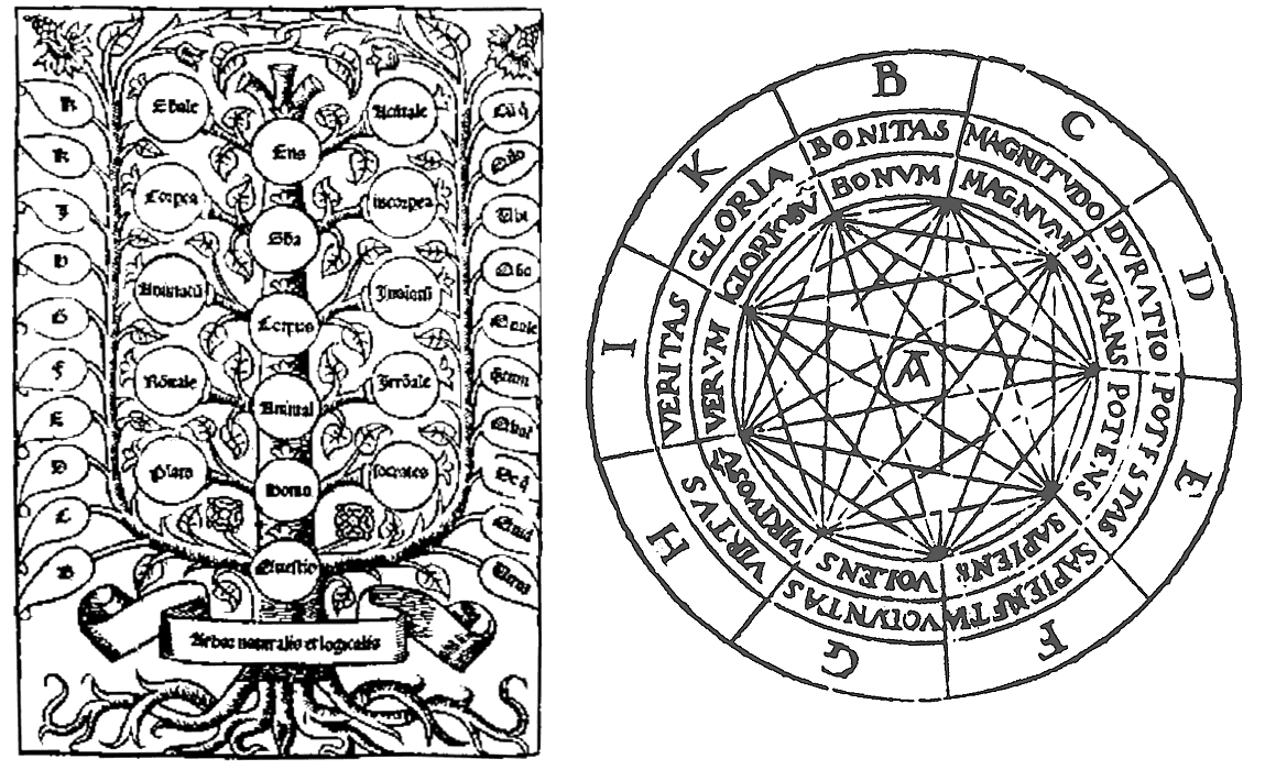 Raimundus Lullus Ars Magna Tree